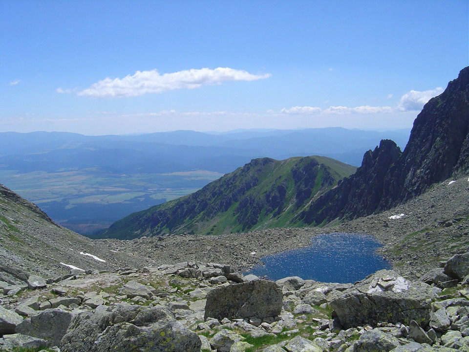 Nizne Wahlenbergovo pleso in Furkotska dolina